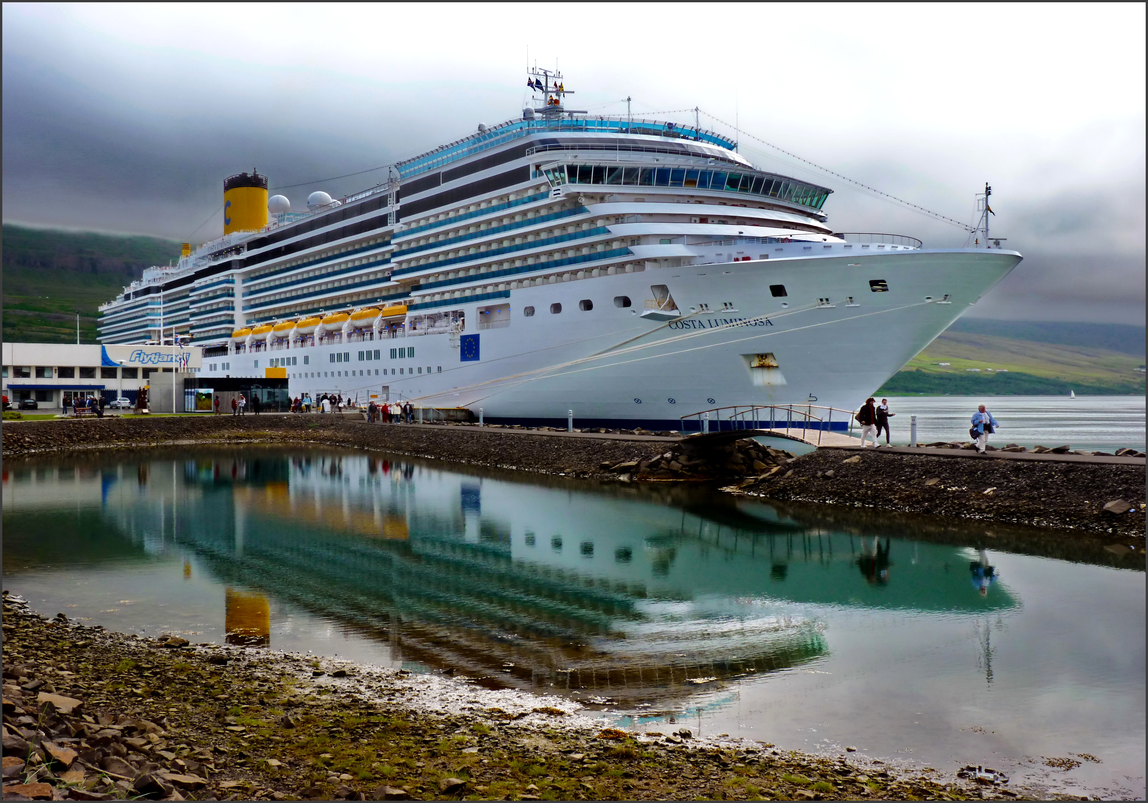 Costa Luminosa in the Akureyri fjord